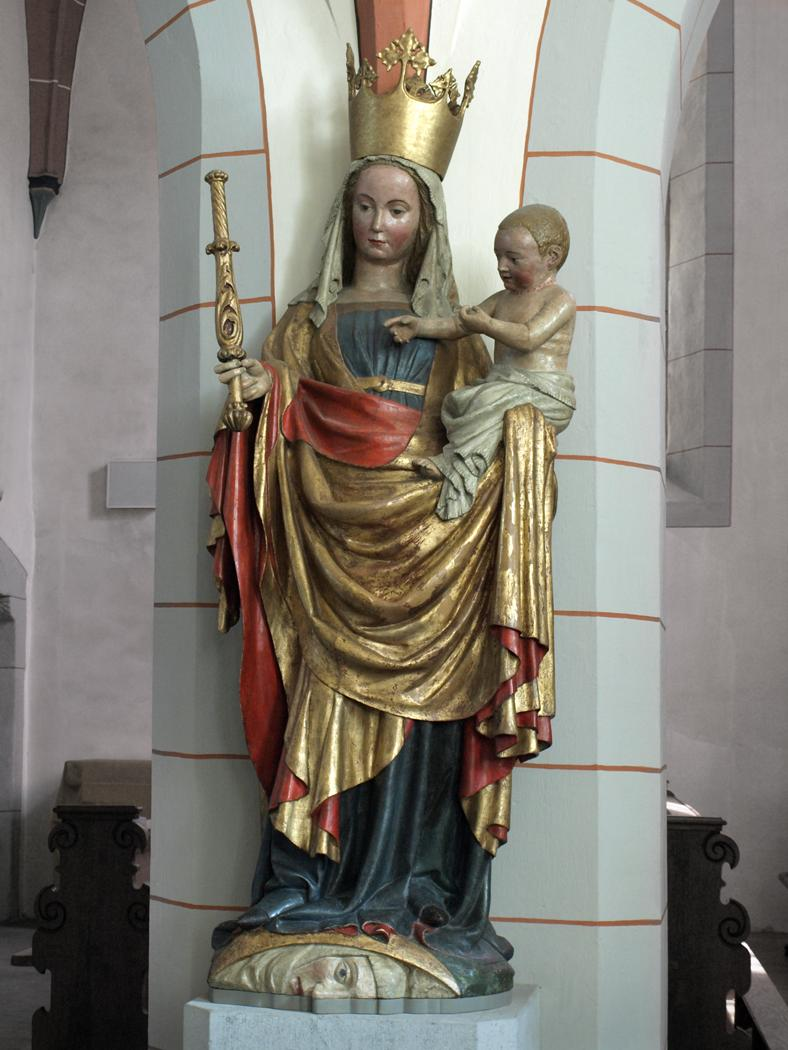 Montabaur, St. Peter in Ketten, Maria Foto 2013